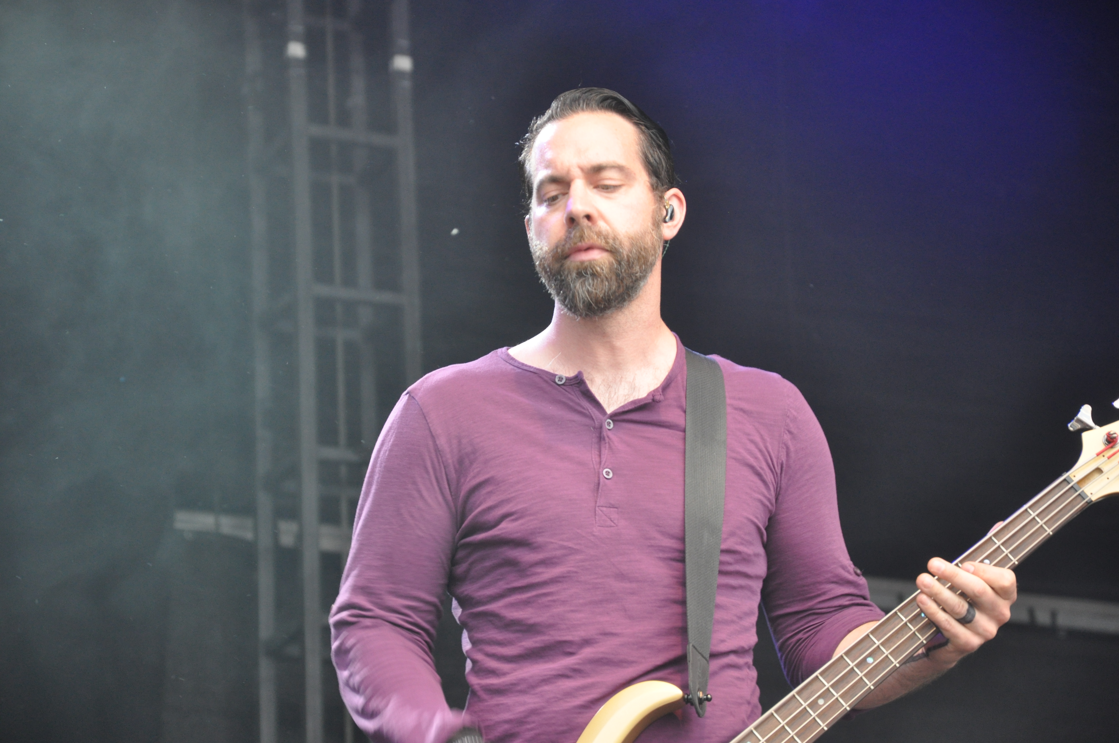 Chevelle bei Rock am Ring 2014